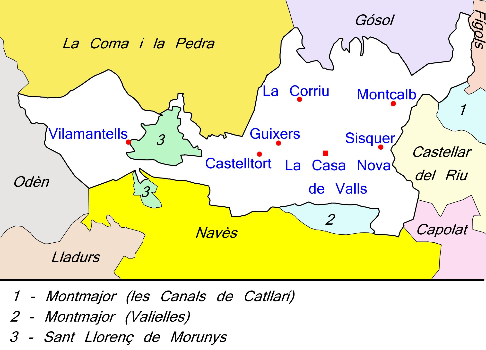 Mapa del municipi de Guixers (Solsonès) amb les seves entitats de població i els municipis limítrofes.